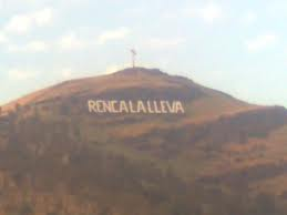 es un letrero parecido al de hollywood pero en renca en la provincia de santiago